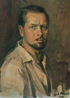 Ritratto del Pittore Gino Borsato